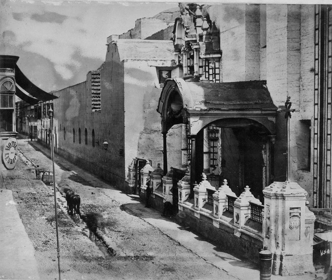 Puerta lateral de la Iglesia de la Virgen de la Merced, por la Calle Jesús Nazareno, en el siglo XIX.